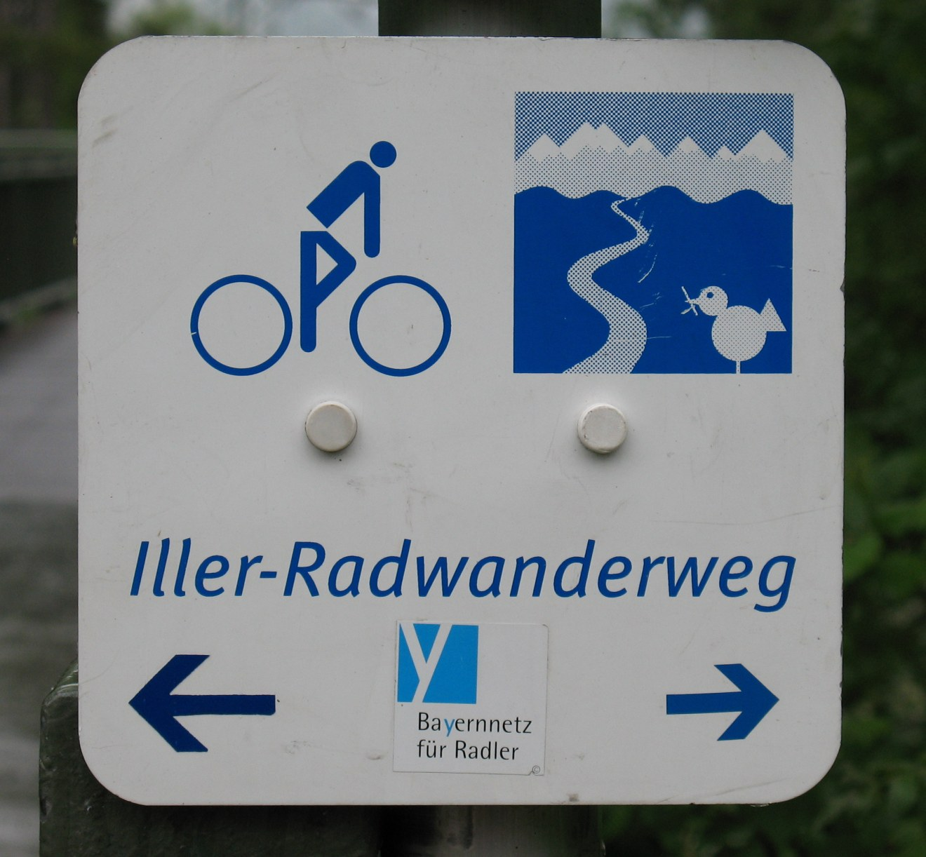 Hinweisschild Iller-Radweg